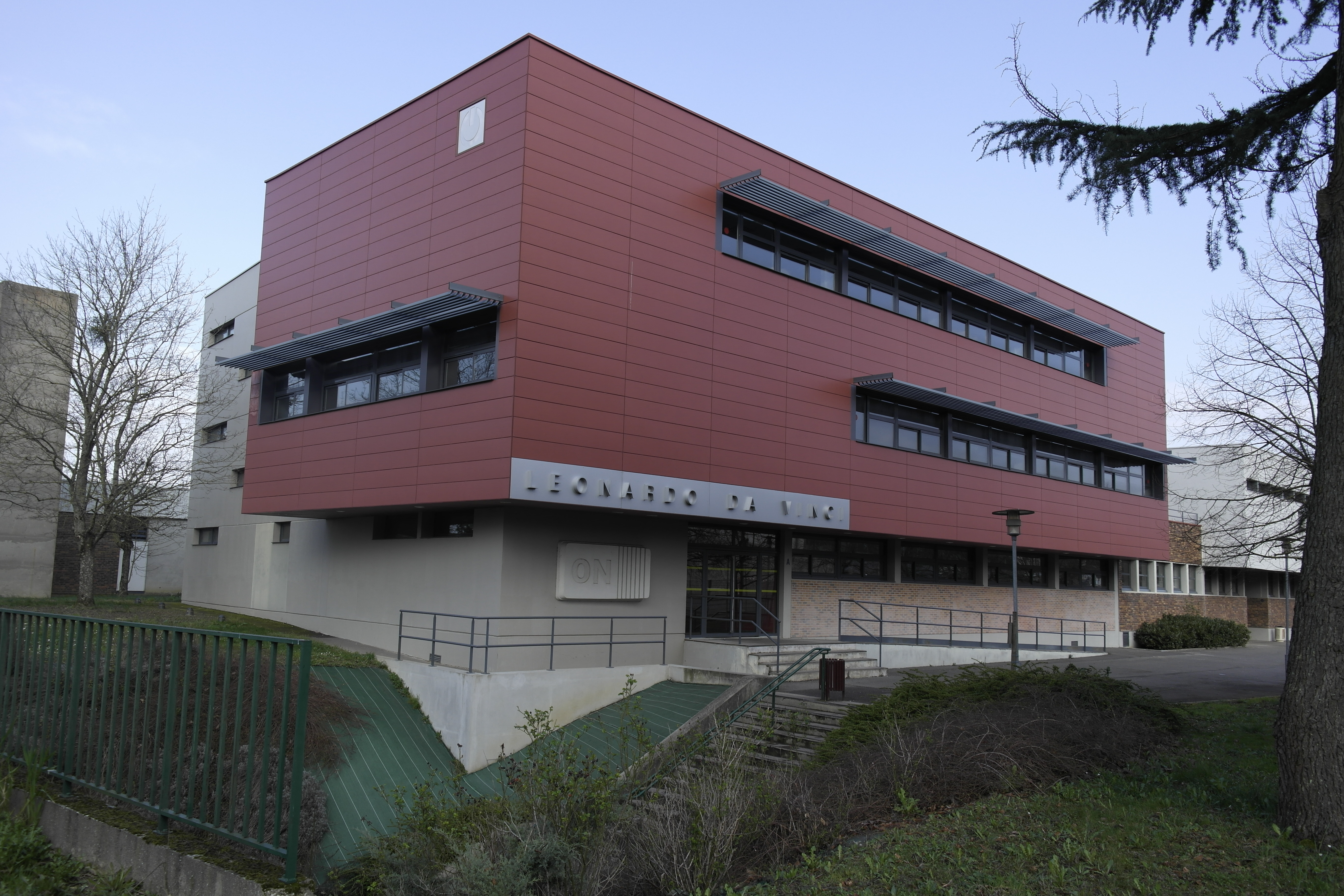 Le bâtiment Vinci, qui abrite la section technique du lycée Augustin-Thierry. Sa façade, baptisée On-Off, est l'oeuvre de l'artiste Nicolas Royer, qui l'a réalisée dans le cadre du 1% culturel (2008).